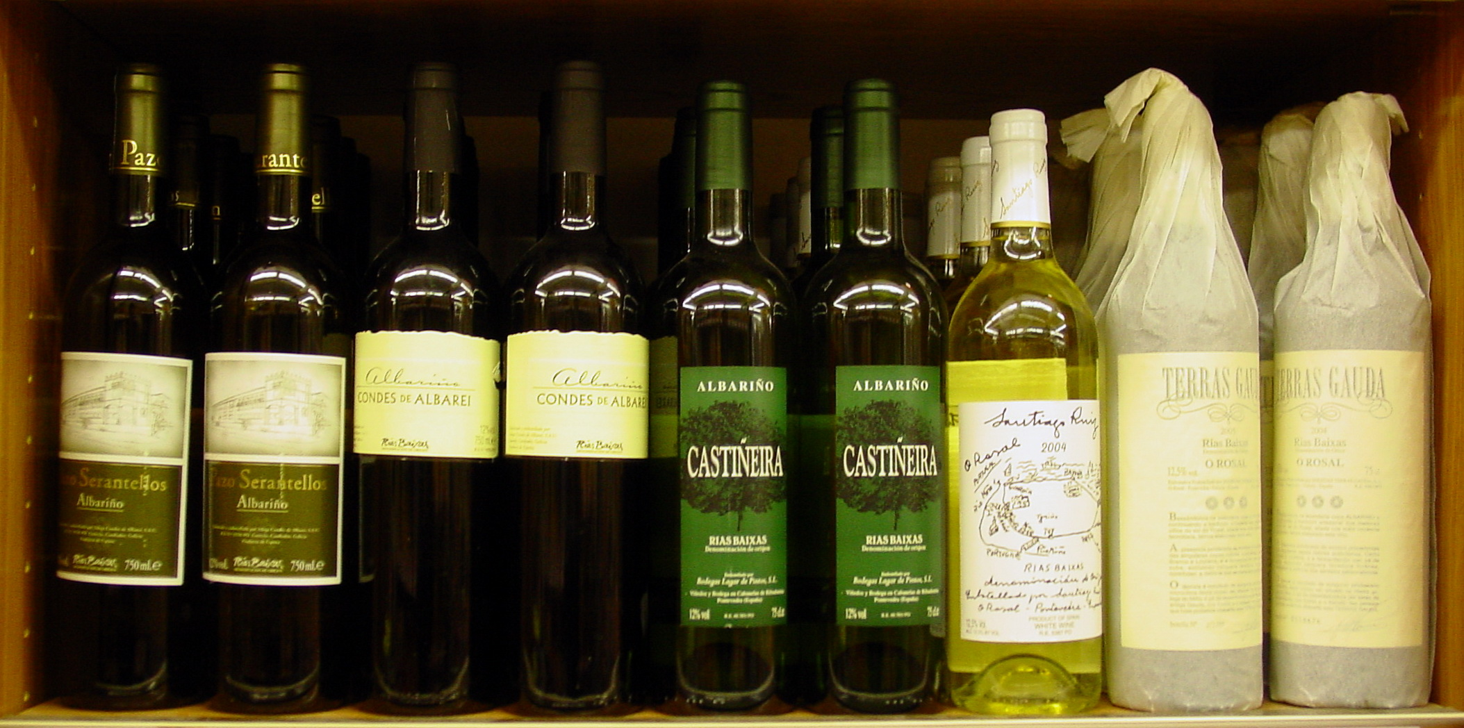 Viños galegos. Denominación de orixe Albariño